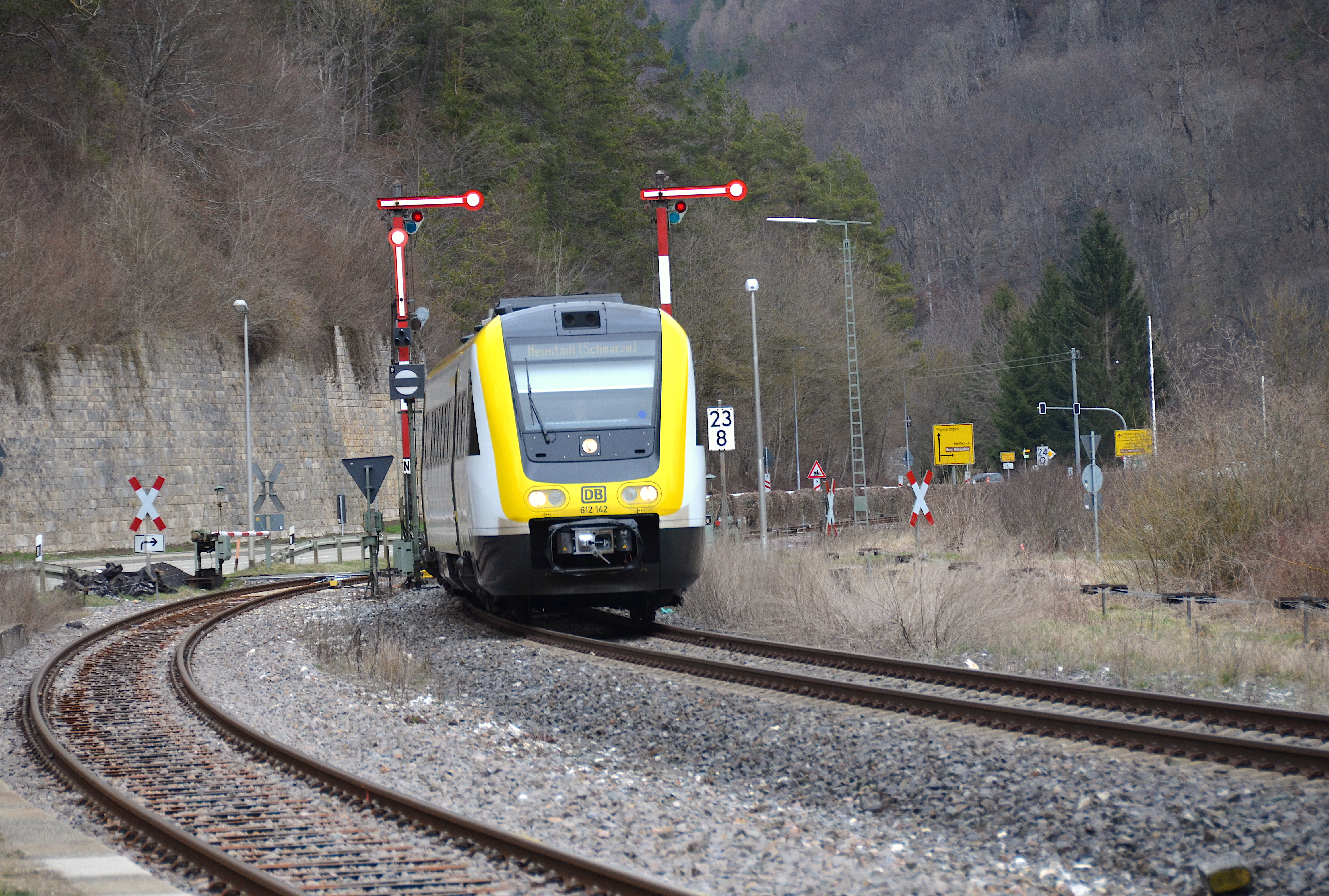 Semaphoren in Hausen im Tal (2018)